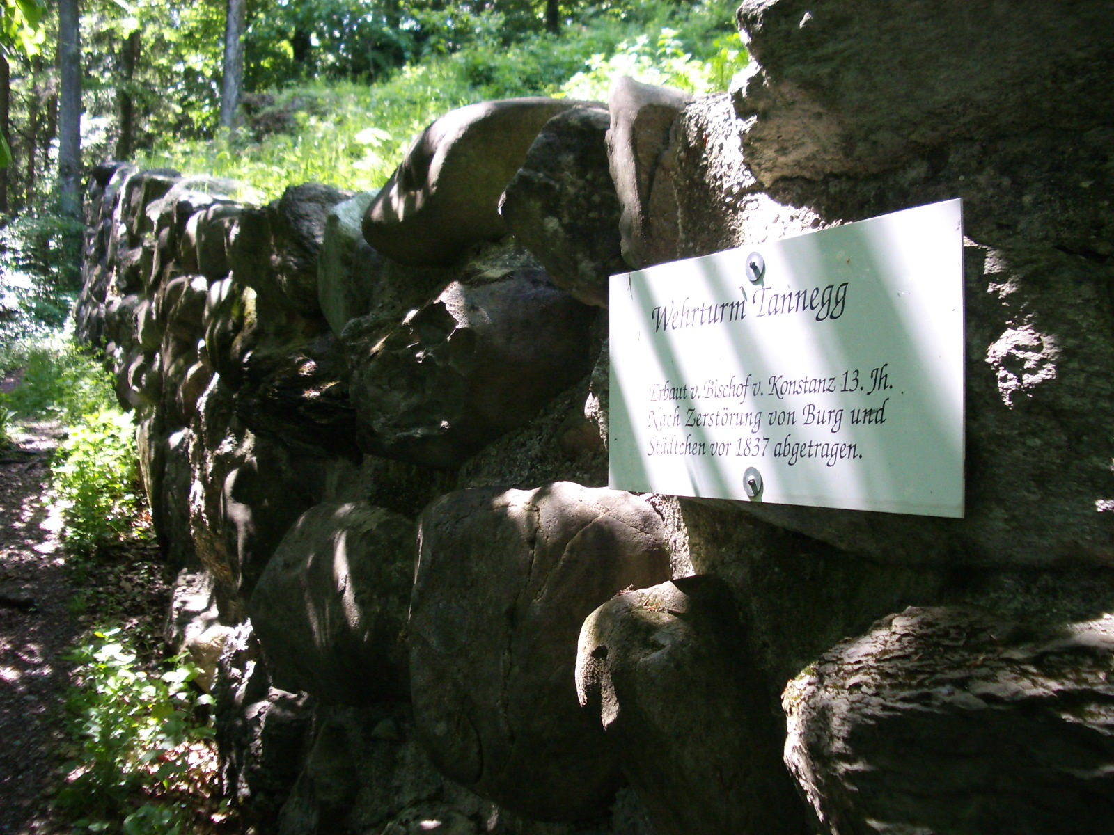 Dussnang TG, Switzerland